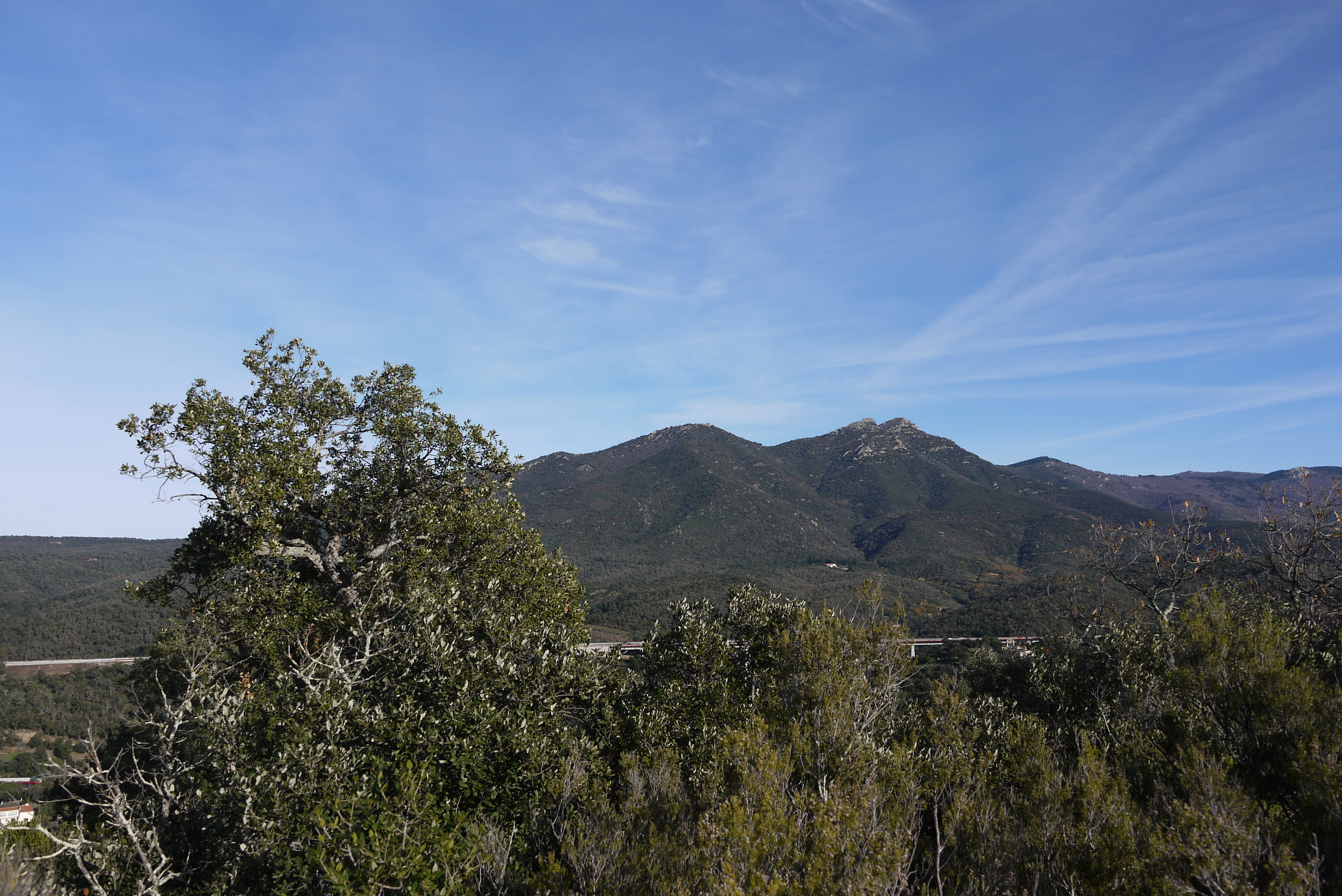 Le Puig de la Balma (à gauche), le Puig Sant Cristau (au centre) et le Pic d'Aureille (à droite), avec en bas l'autoroute A9, vus depuis les hauteurs de Maureillas.